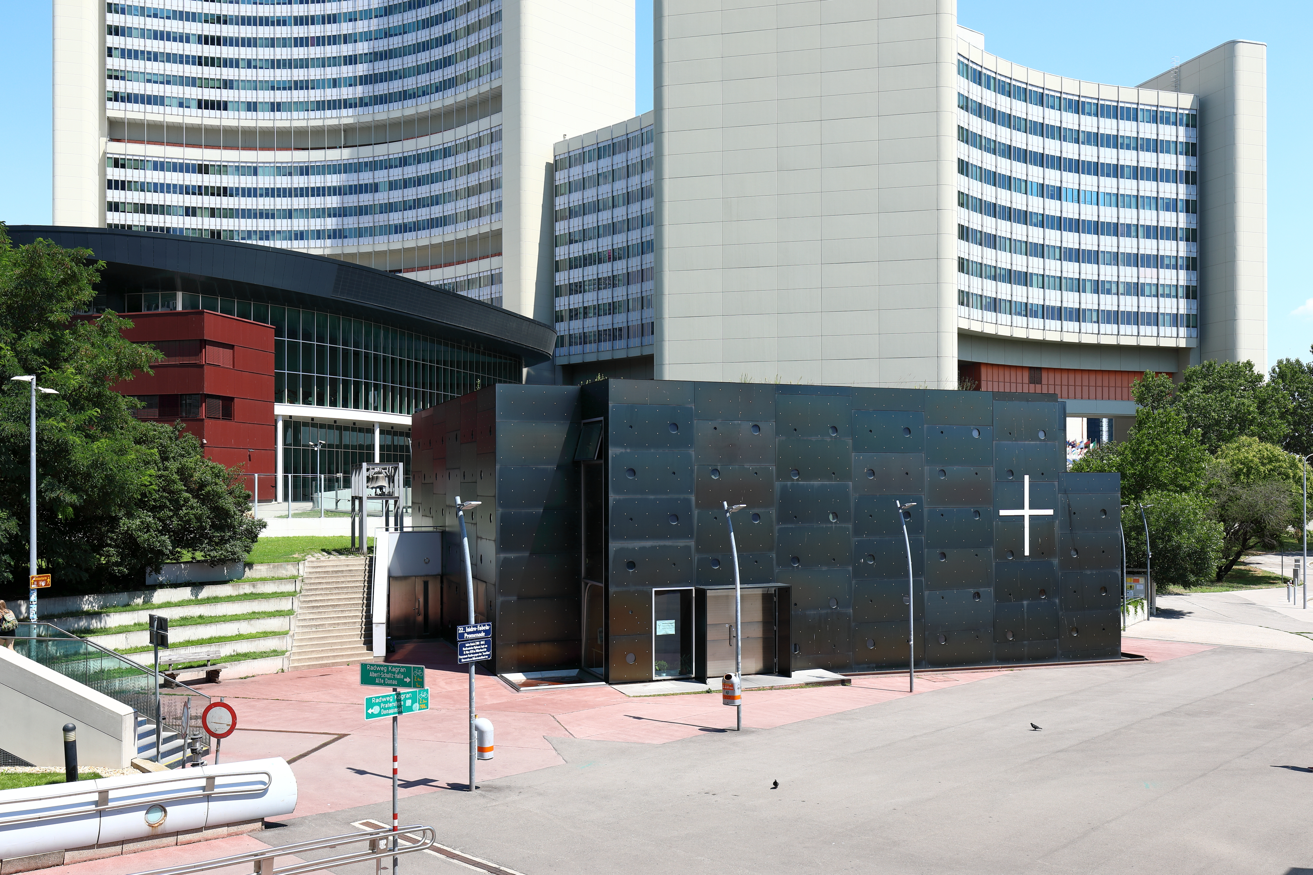 Die nach den Plänen von Heinz Tesar in den Jahren 1999/2000 errichtete Donau-City-Kirche im 22. Wiener Gemeindebezirk Donaustadt und im Hintergrund das von 1973 bis 1979 errichtete Vienna International Centre (VIC) sowie links das 2009 fertiggestellte VIC-Konferenzgebäudes (Gebäude M) des Architekten Albert Wimmer.